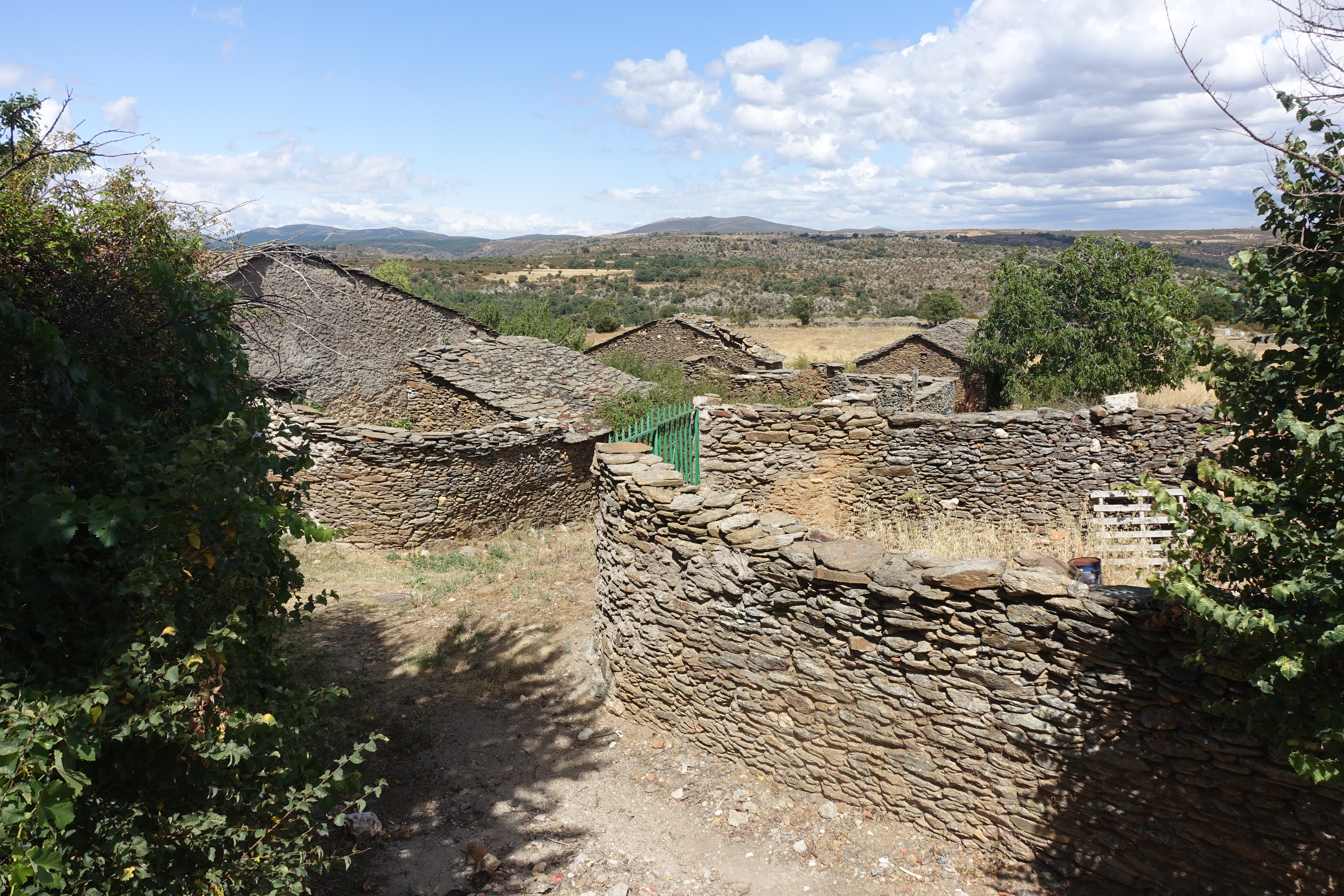 Arquitectura tradicional en Zarzuela de Jadraque (Guadalajara, España).